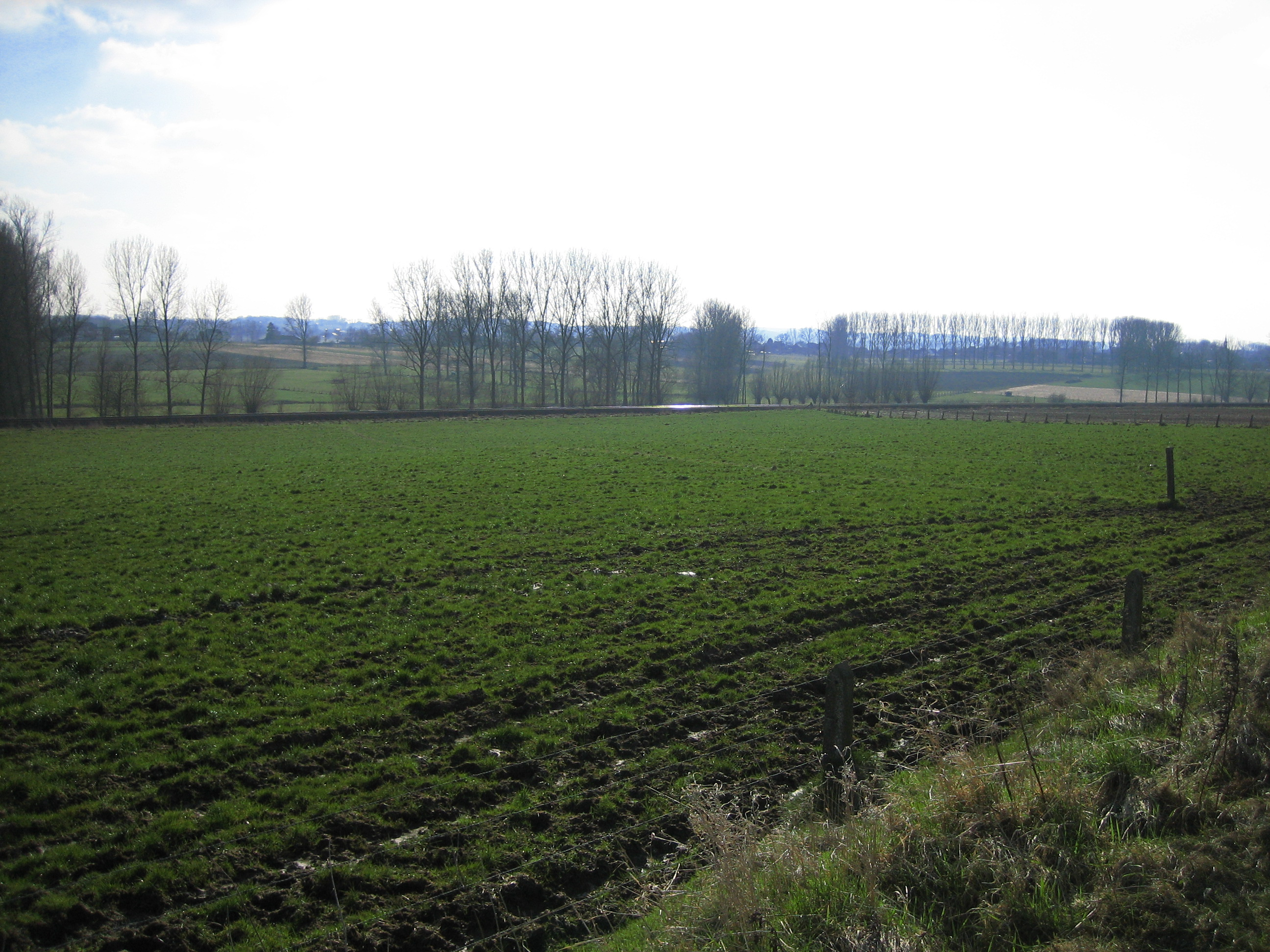 Landschap in Sint-Martens-Lierde, Arrondissement Oudenaarde